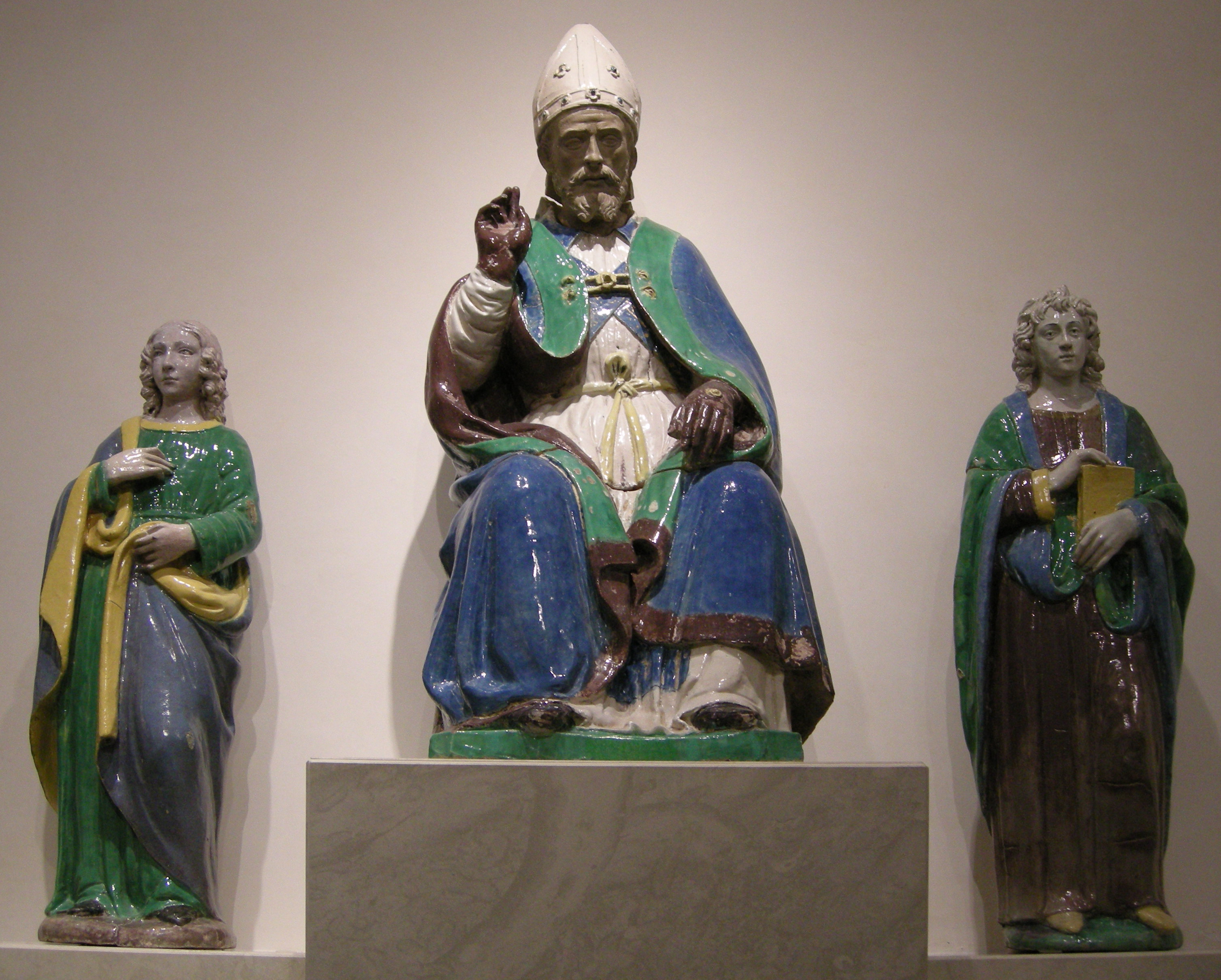 Benedetto buglioni e bottega, san romolo e due suoi compagni martiri, 1515-20